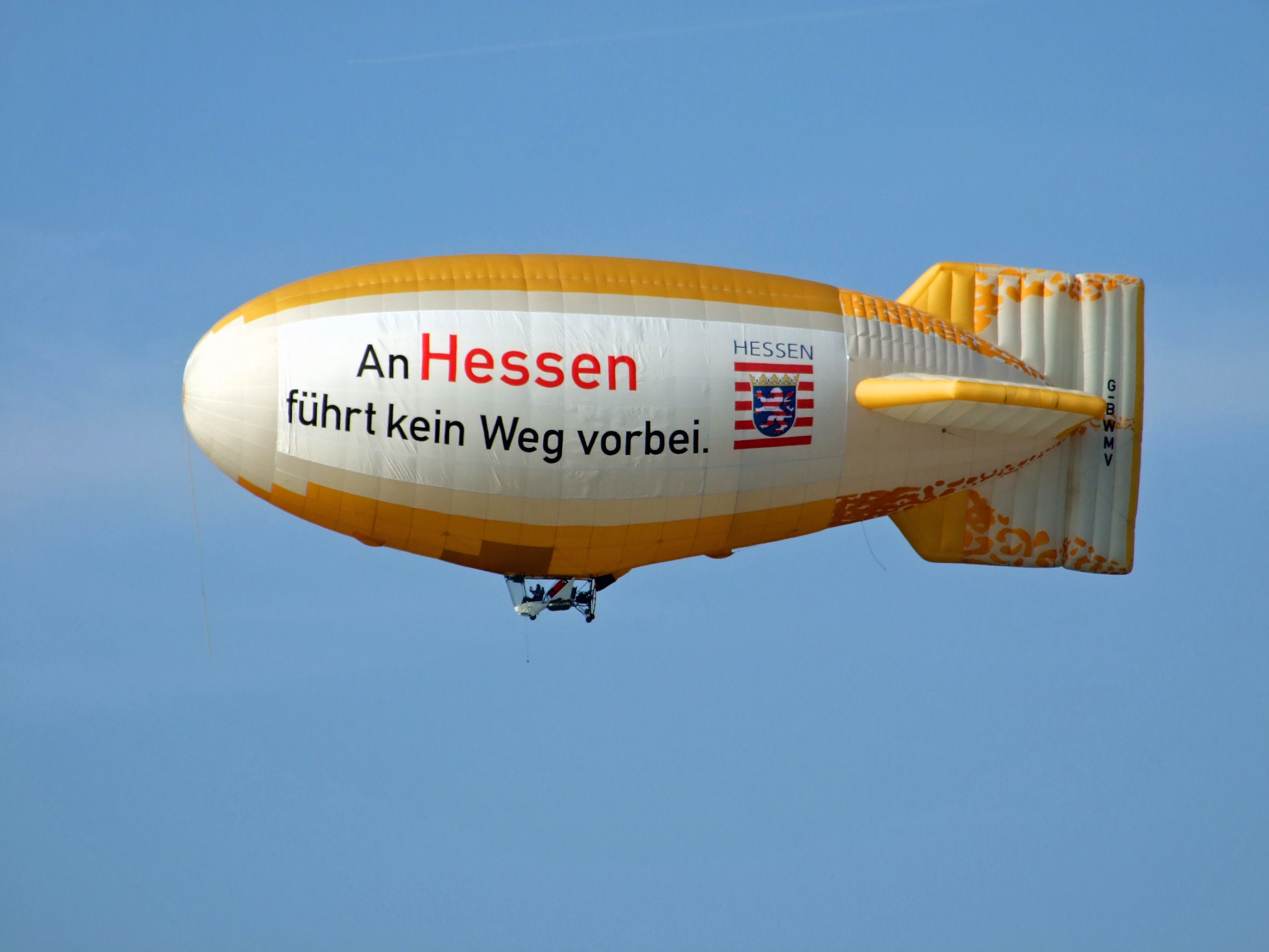 Blimp über Frankfurt, gesehen vom MAIN TOWER